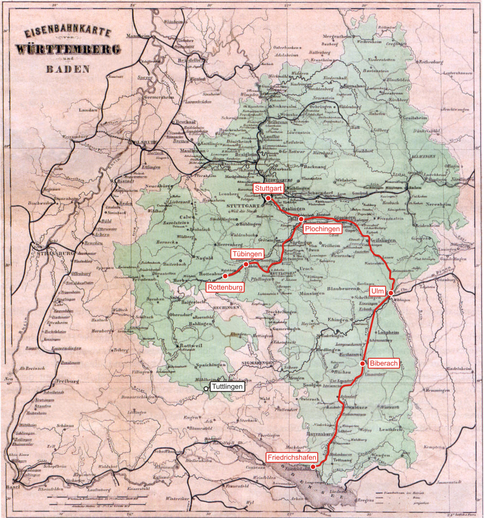 Modifizierte Kartenvorlage für den Artikel Bahnhof Tuttlingen